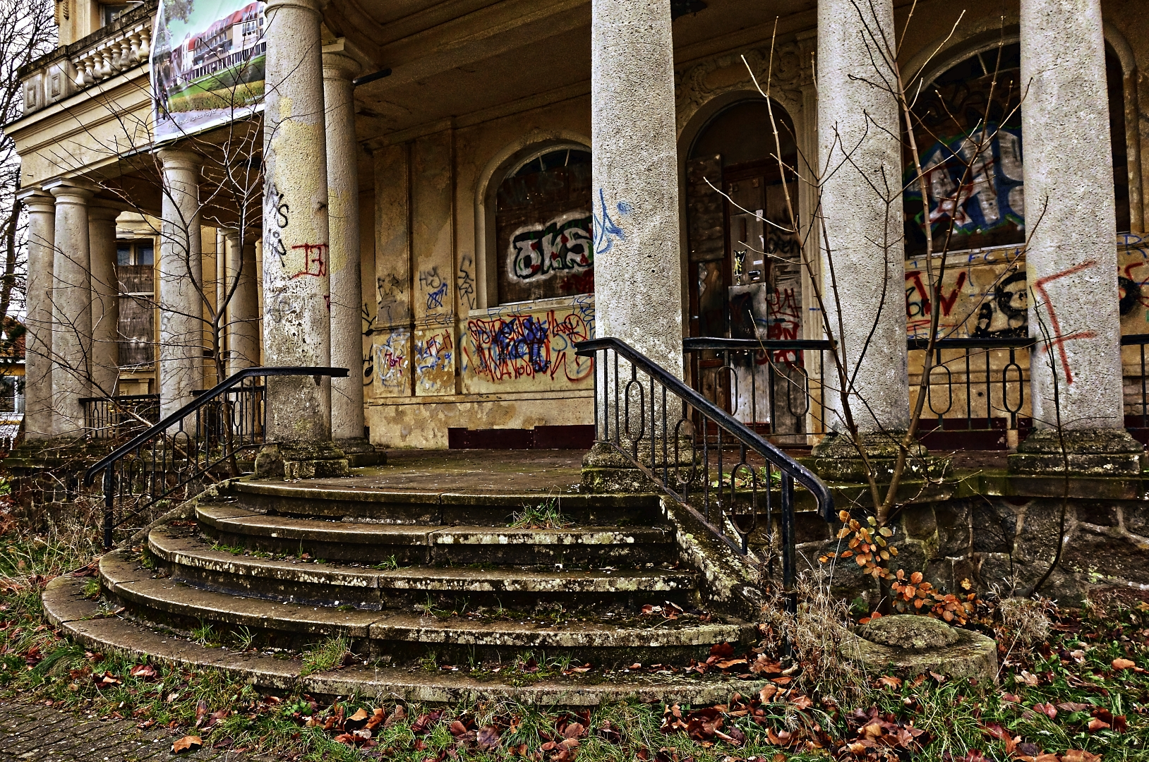 Der verfallene Eingangsbereich der Villa Baltic in Kühlungsborn